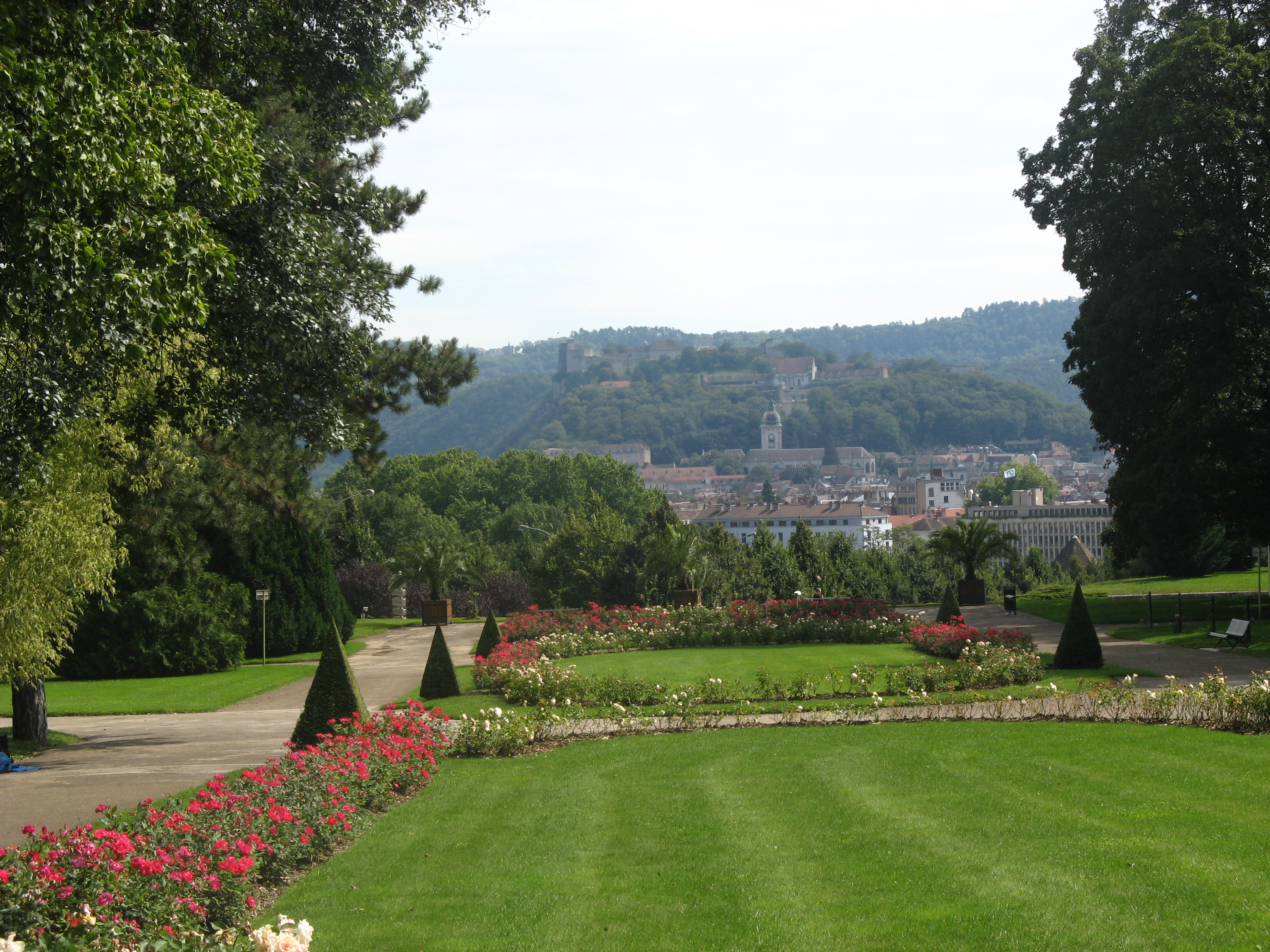 Vue sur Besançon depuis la gare